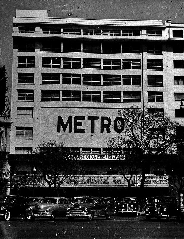 Fachada del Cine Teatro Metro, poco antes de su inauguración en octubre de 1956. Arquitecto: Albert Bourdon. Hoy es el Hotel NH Tango.